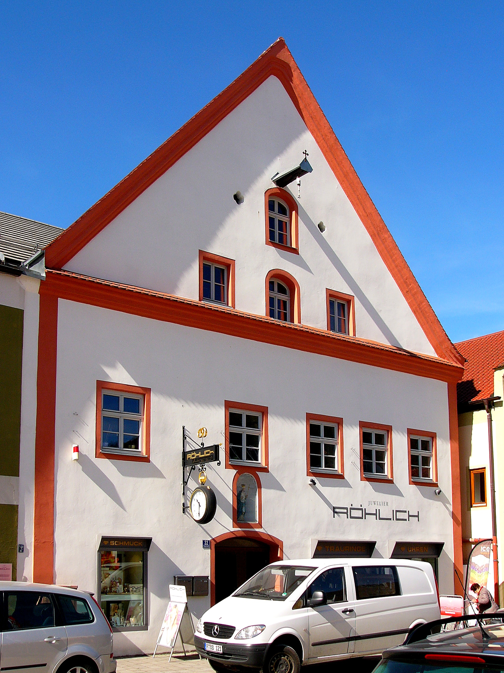 Giebelhaus; 18. Jahrhundert. This is a photograph of an architectural monument.